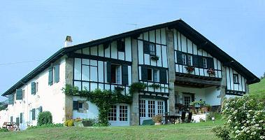 Uhartea (Sara, Lapurdi)